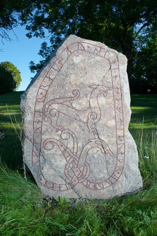 RAÄ-nummer Funbo 1:1. Inskriften lyder: "Tjägn och Gunnar reste stenarna efter Väder, sin broder".